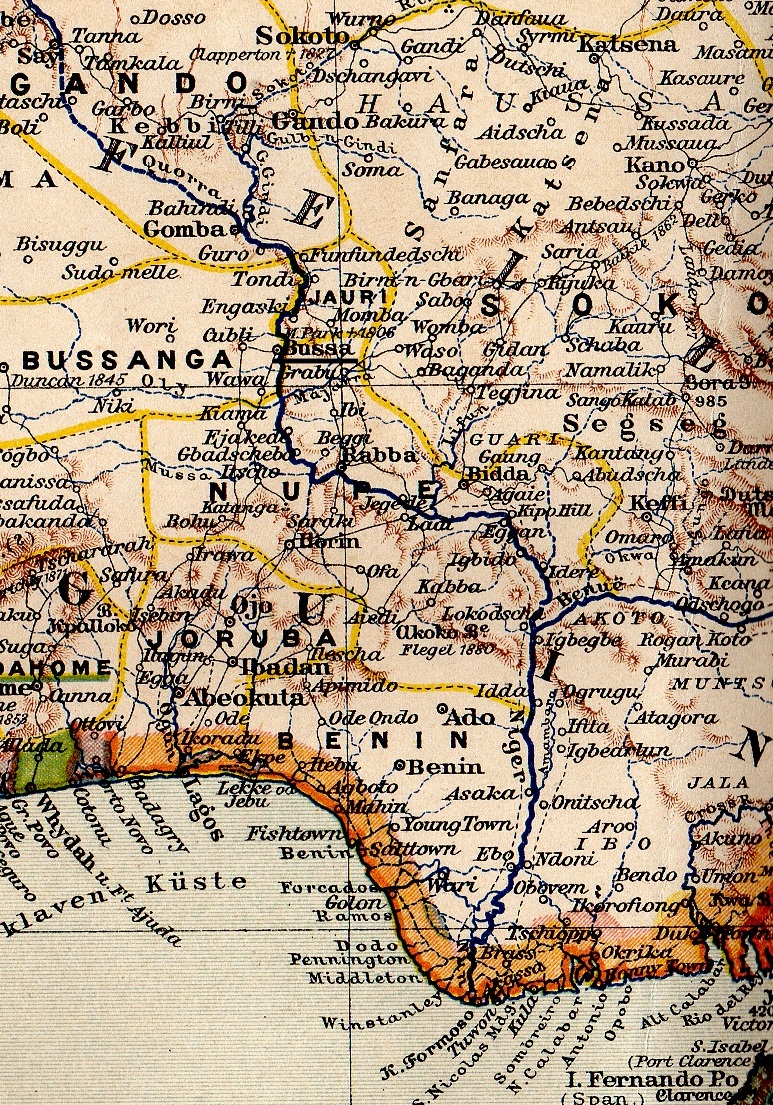 Cours du Niger méridional selon une carte allemande de 1889 (détail). "Boussa" souligné.